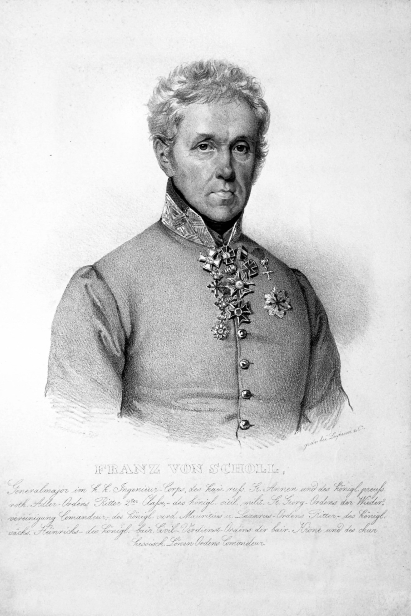 Franz von Scholl, Austrian general